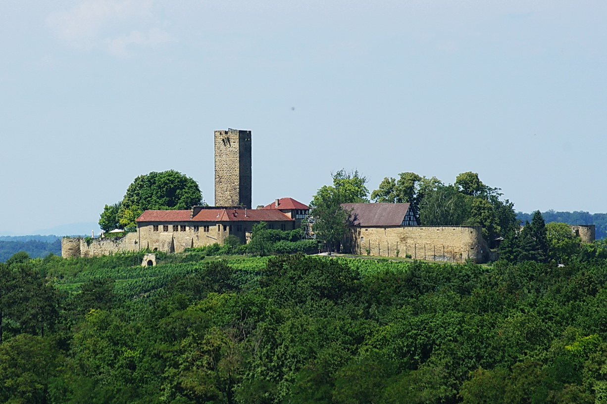 Burg Ravensburg bei Sulzfeld